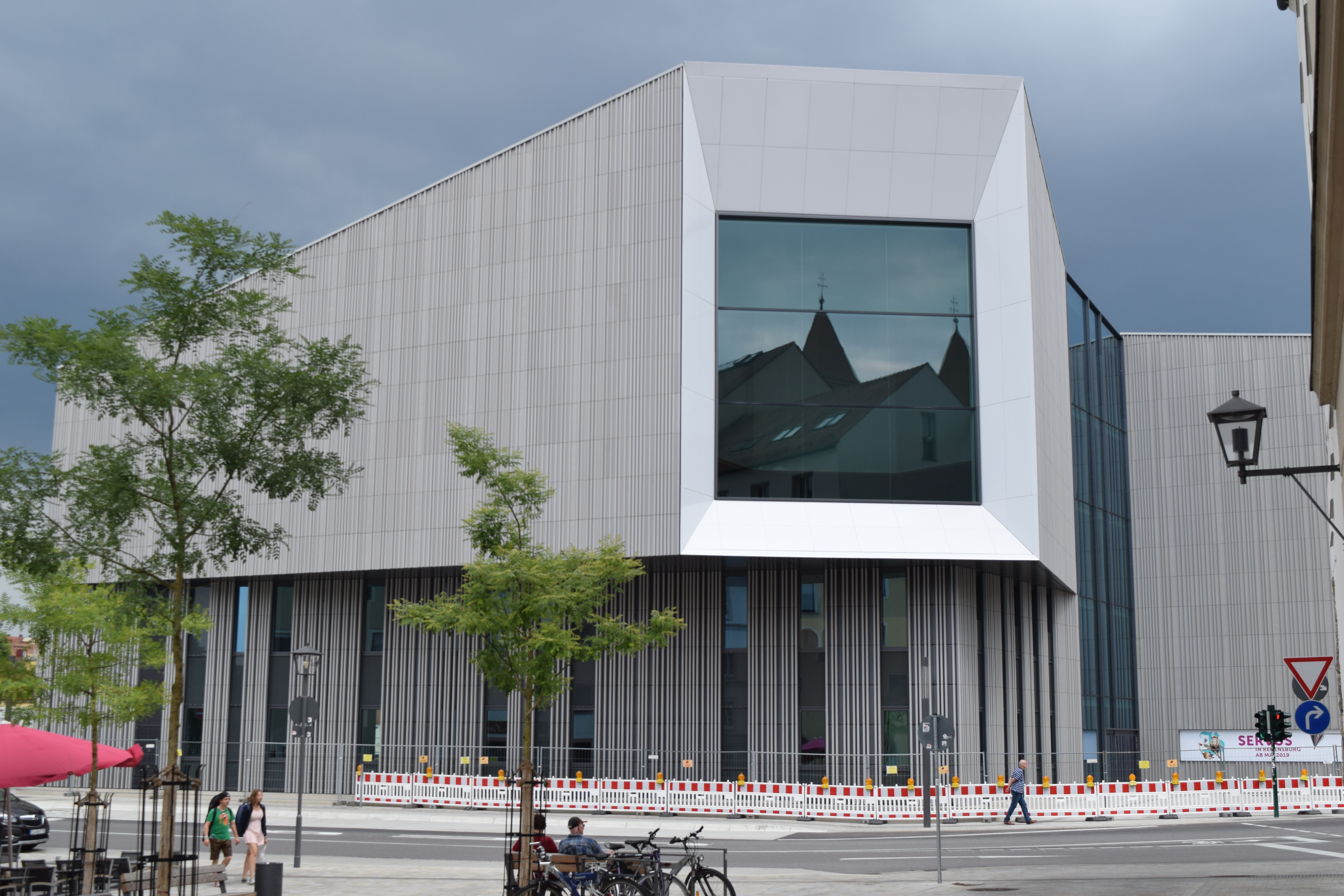 Charakteristisches Dom-Fenster Museum für bayerische Geschichte. (Im Fenster spiegeln sich aber hier die Türme der Niedermünsterkirche, nicht die Domtürme. Fotografiert im Juni 2018